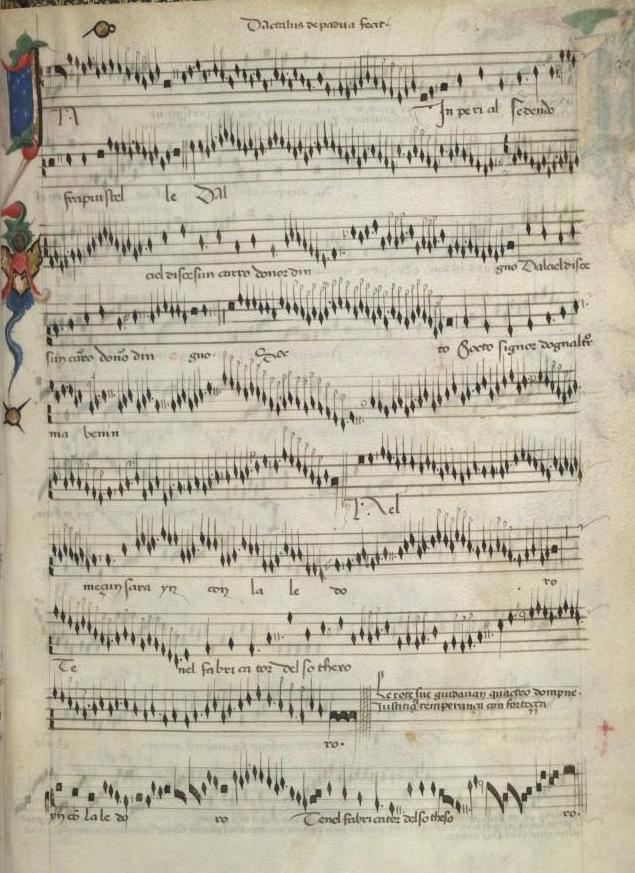 Modena BE α. 5,25